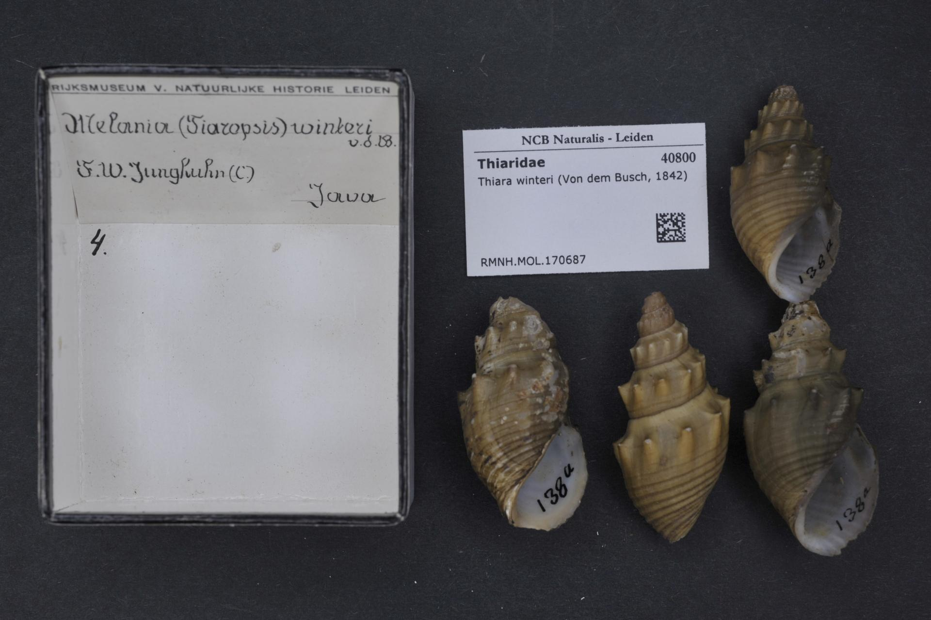 Thiara winteri (Von dem Busch, 1842)